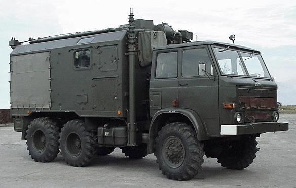 Radiostacja jednowstęgowa KF R-140M na samochodzie Star-266. Zdjęcie pochodzi ze strony